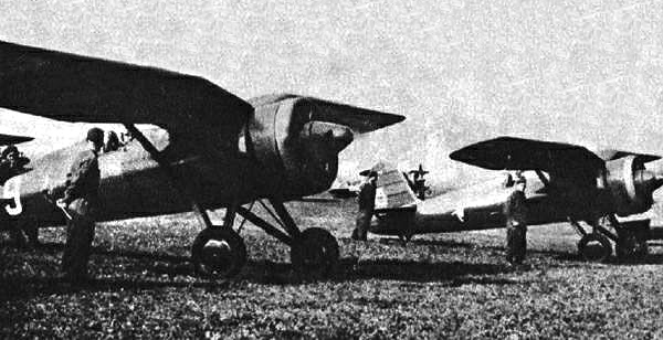 PZL P11 c gotowe do lotu. Z 3 pułku lotniczego w Poznaniu - Ławicy. Zdjęcie archiwalne.